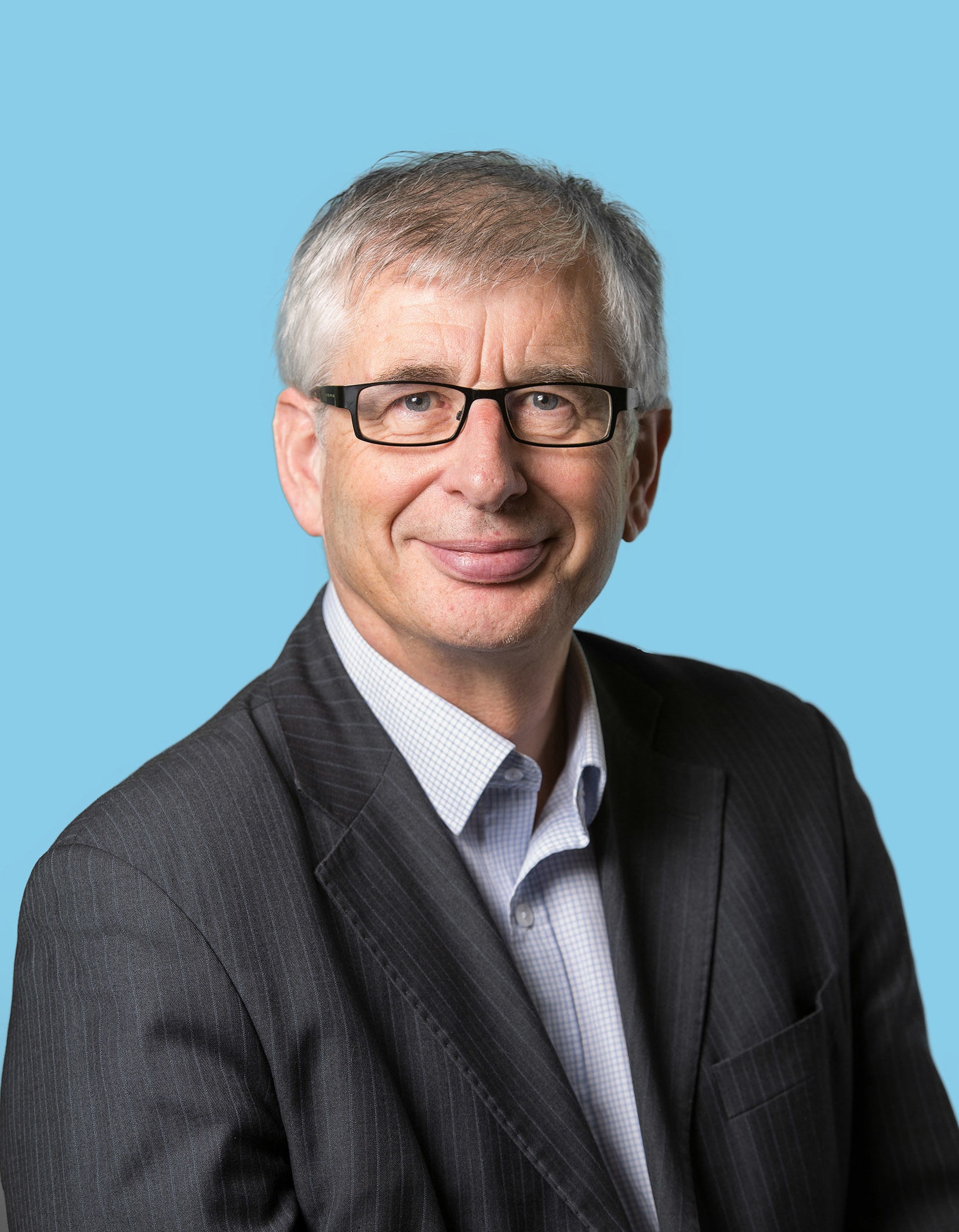 Tweede Kamerlid. Foto: Lex Draijer.